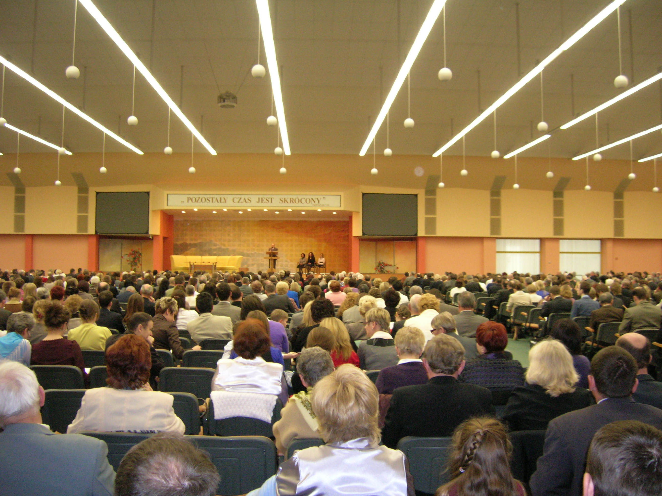 Centrum Kongresowe Świadków Jehowy Sosnowiec (Hala główna), Zgromadzenie specjalne „Pozostały czas jest skrócony”